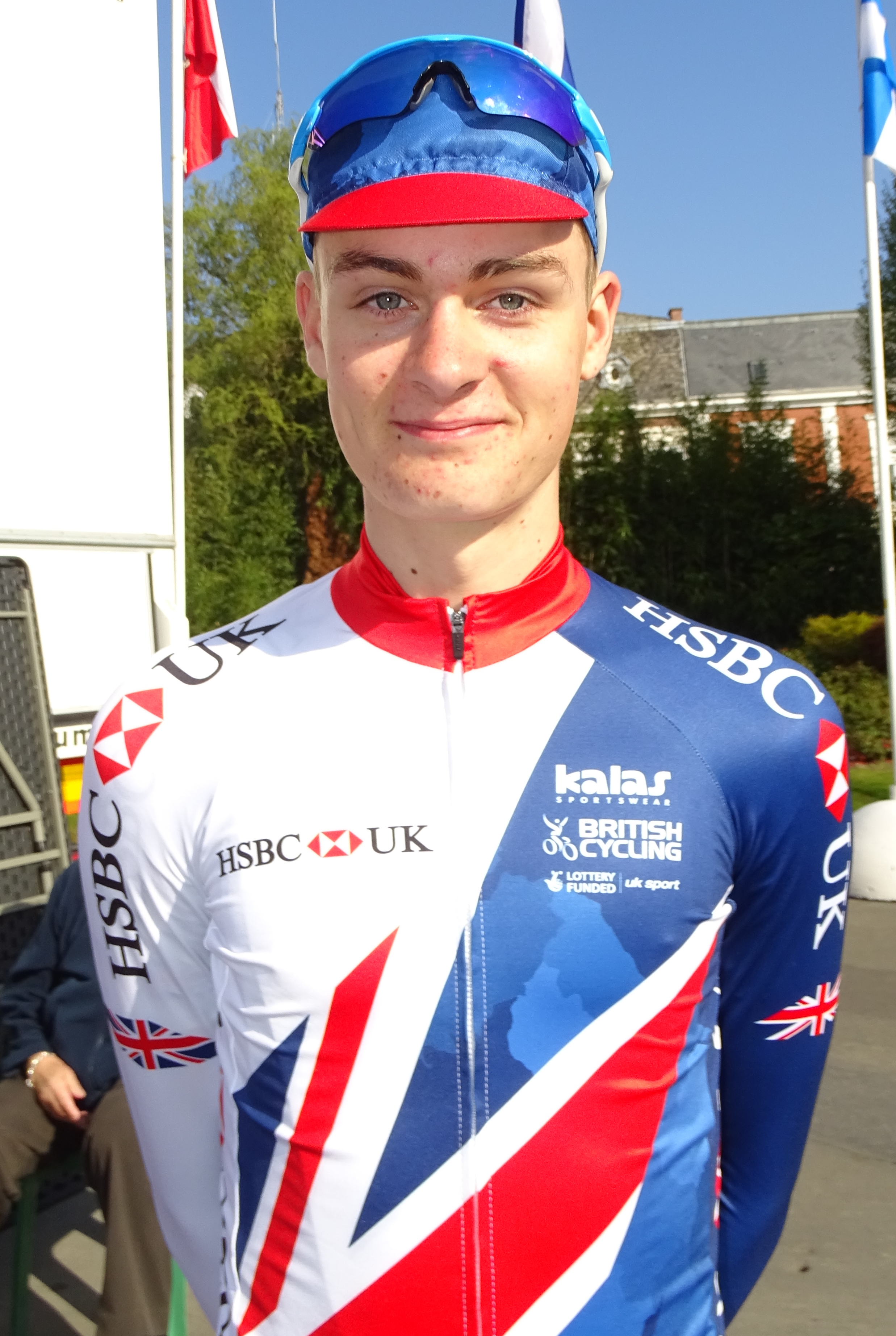 Reportage réalisé le dimanche 9 avril à l'occasion du départ du Paris-Roubaix juniors 2017 à Saint-Amand-les-Eaux, France.